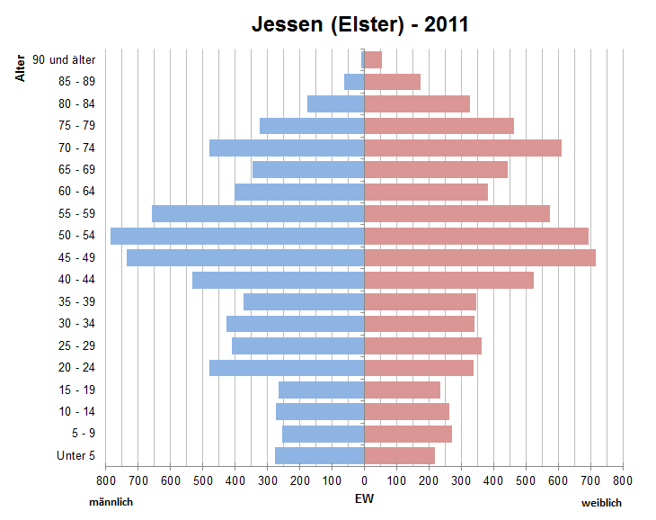 Bevölkerungspyramide der Stadt Jessen (Elster) nach Zensus 2011.